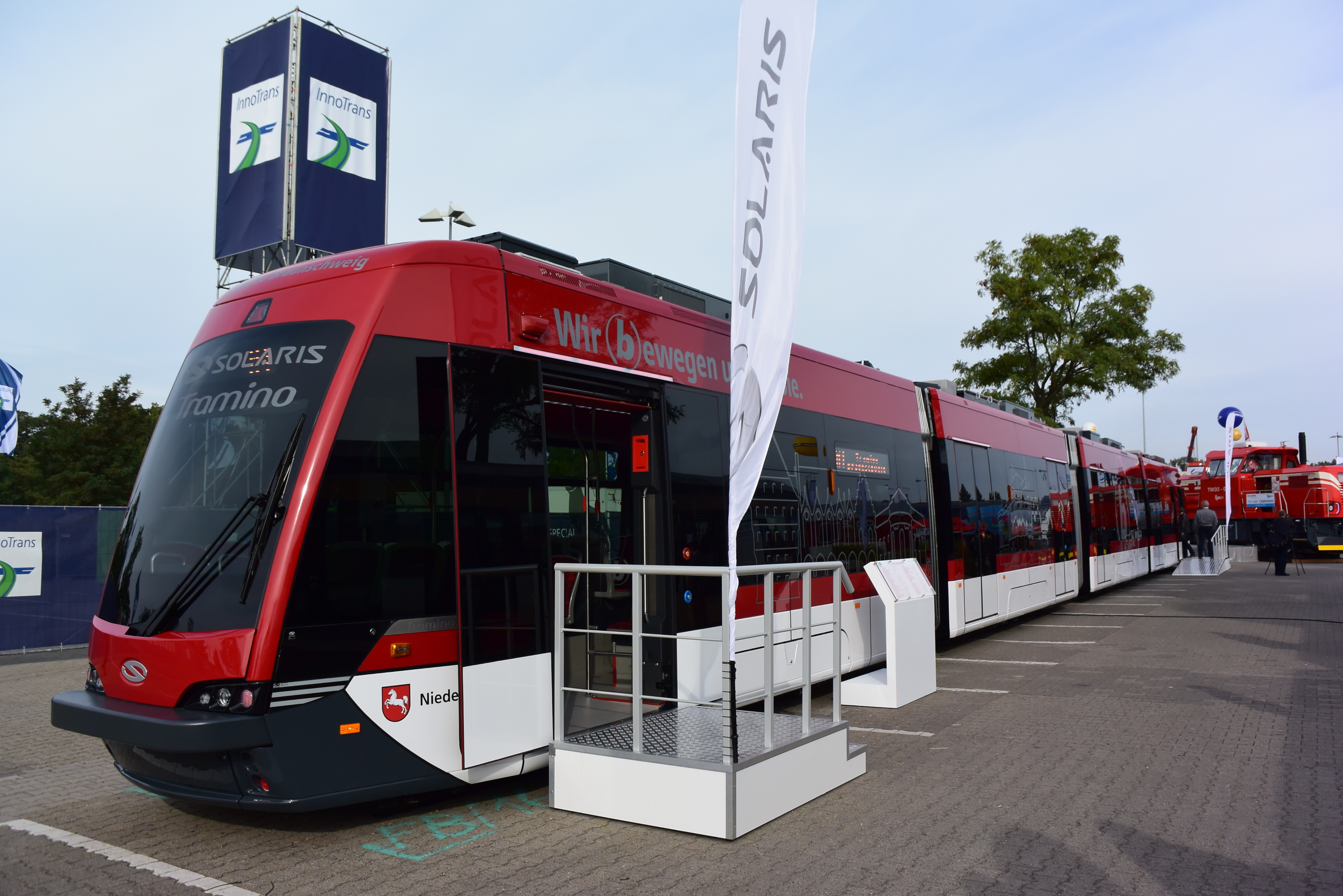 Solaris Tramino Braunschweig podczas InnoTrans 2014